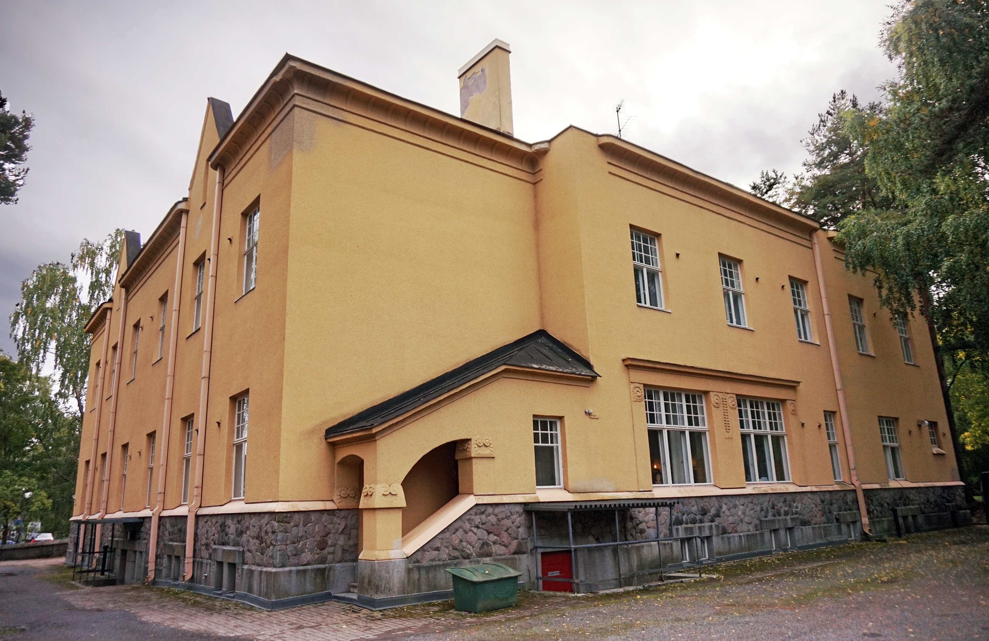 Pirkanmaan musiikkiopisto, Tampere.This photograph was taken with a Sony ILCE-5000